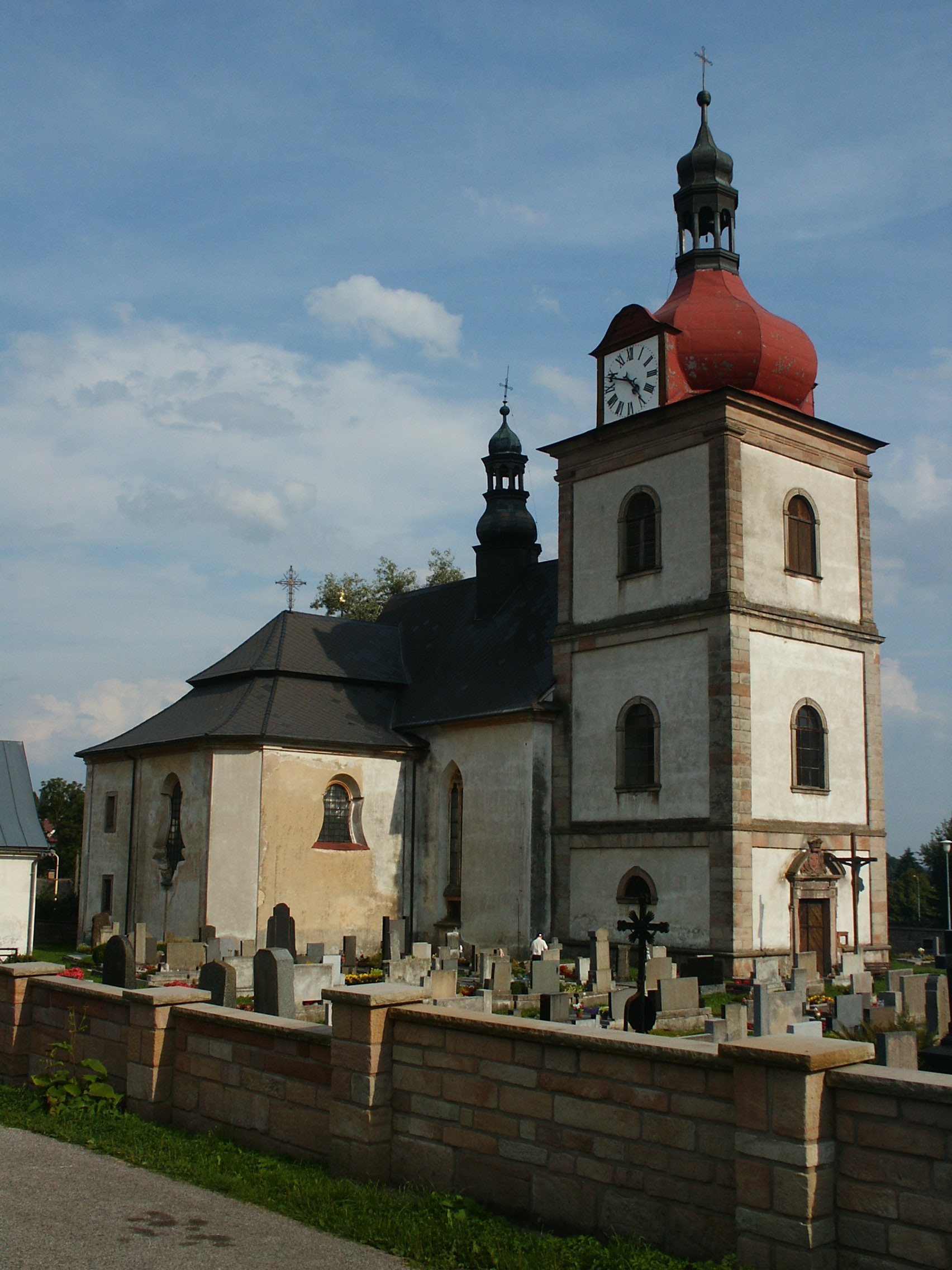 Kostel sv. Mikuláše, Horní Branná - pohled od SZ